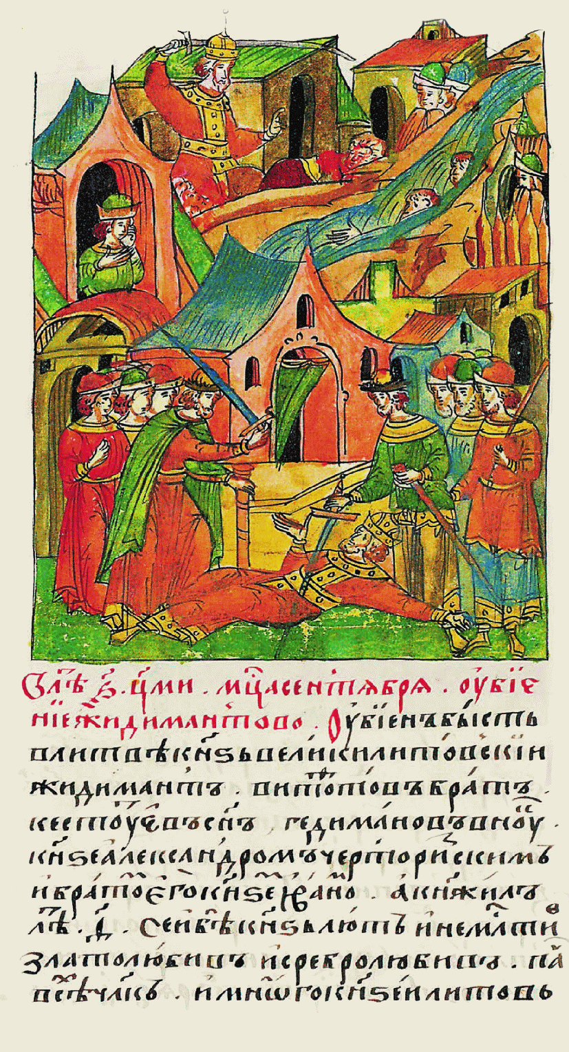 В ту же осень родился у ве- ликого князя Василия Васильевича сын Юрий Старший.